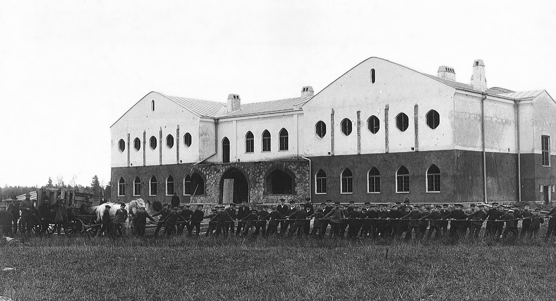 Vändra Gümnaasumihoone keskküttekatla transport kihelkonnakooli poiste abil 1912. aasta sügisel.